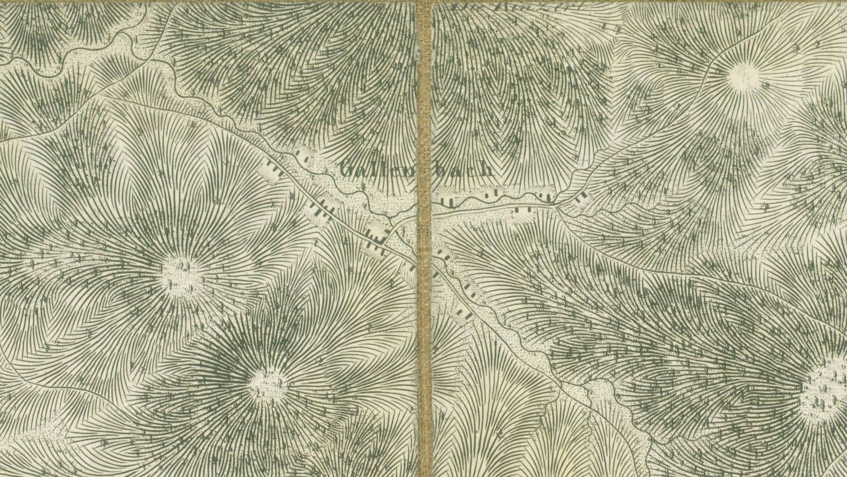 Auschnitt aus Blatt 20 der Haas´schen Karte mit dem Dorf Galmbach, dort noch Gallenbach genannt, dem heutigen Eduardsthal. ACHTUNG die Karte muss etwa 30° im Uhrzeigersinn gedreht werden, damit Norden oben ist.